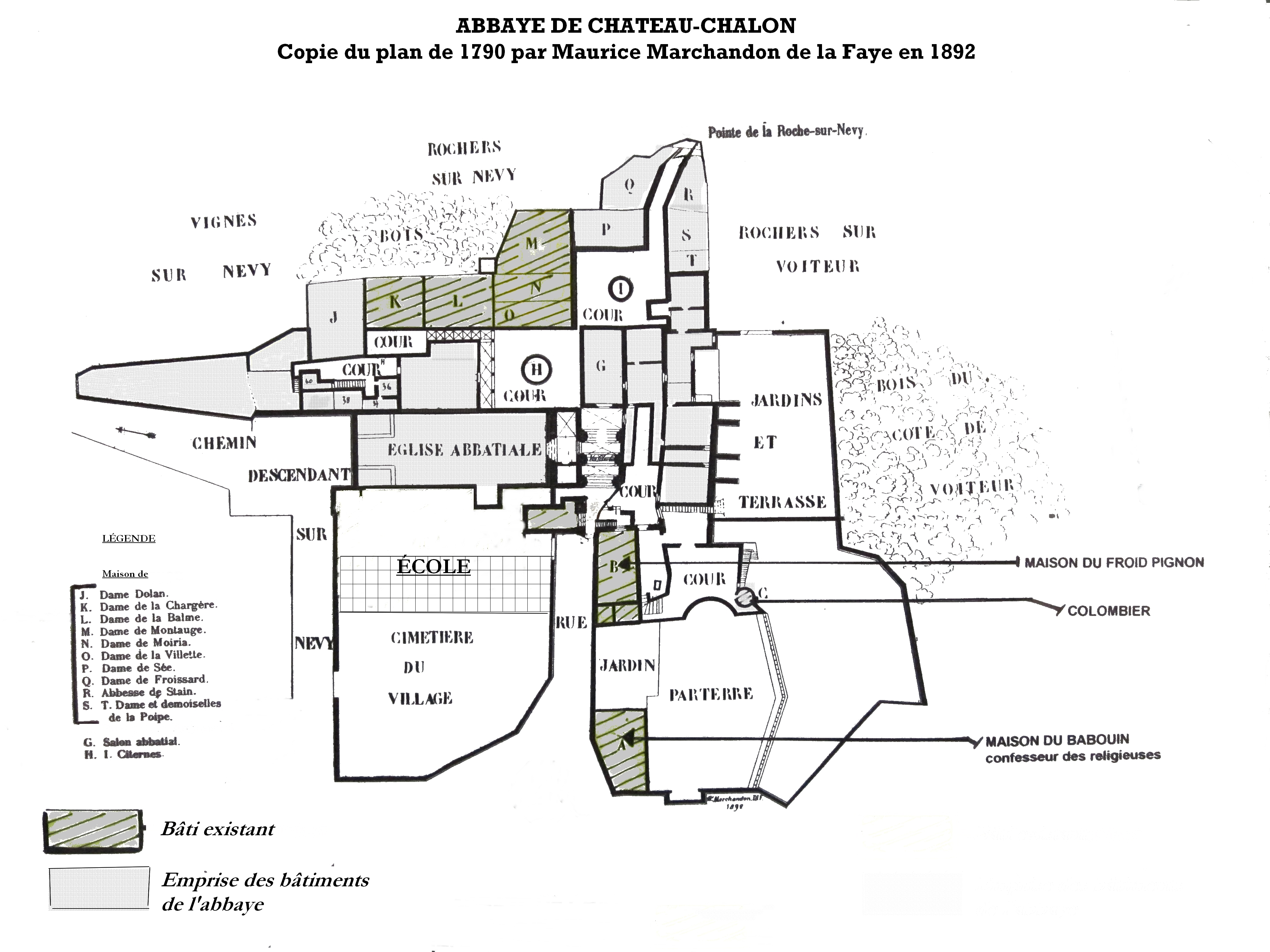 Château-Chalon - Copie du plan de l'abbaye de 1790 par Maurice Marchandon de la Faye en 1892